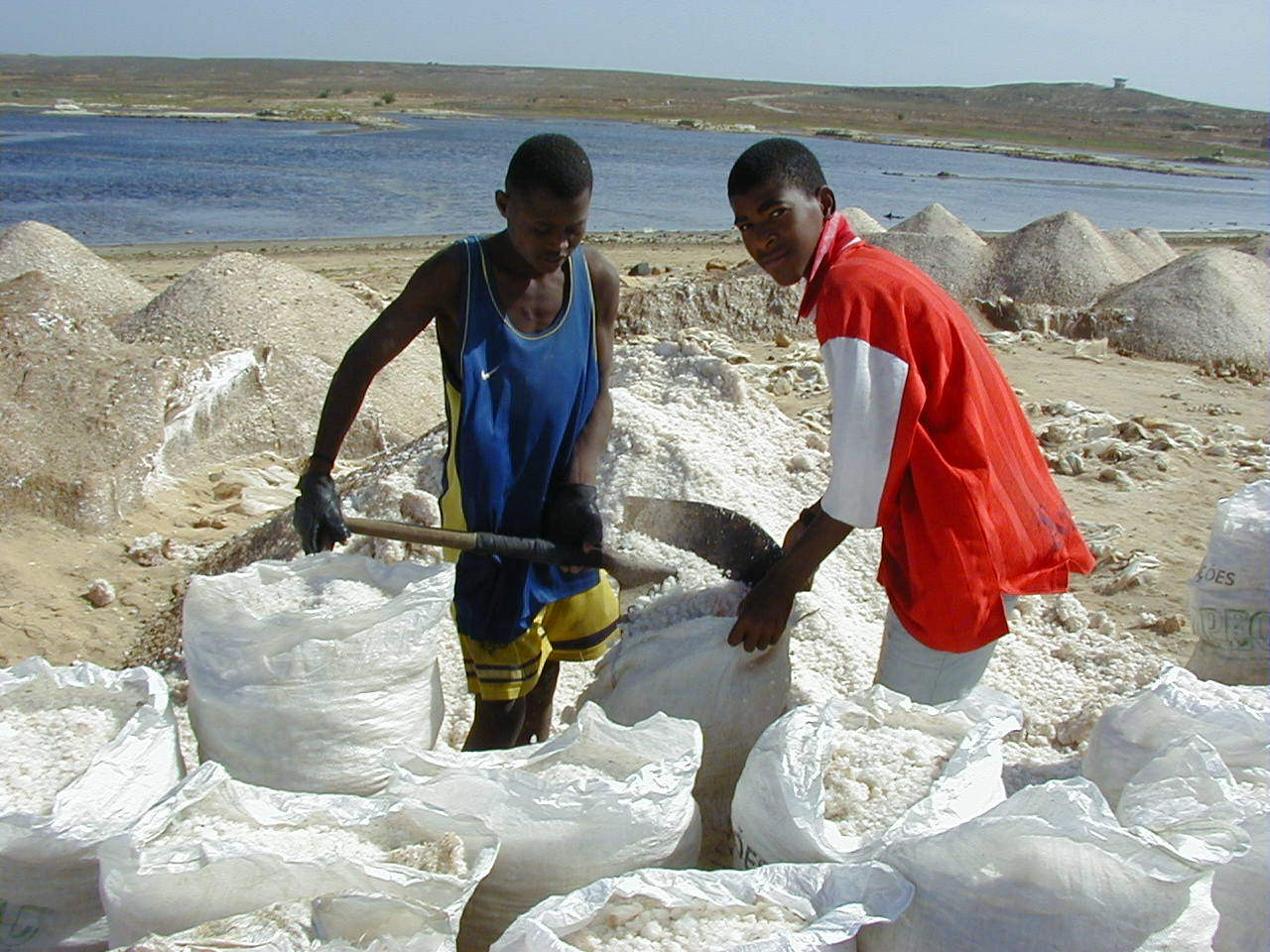 Sea-salt-minemaio